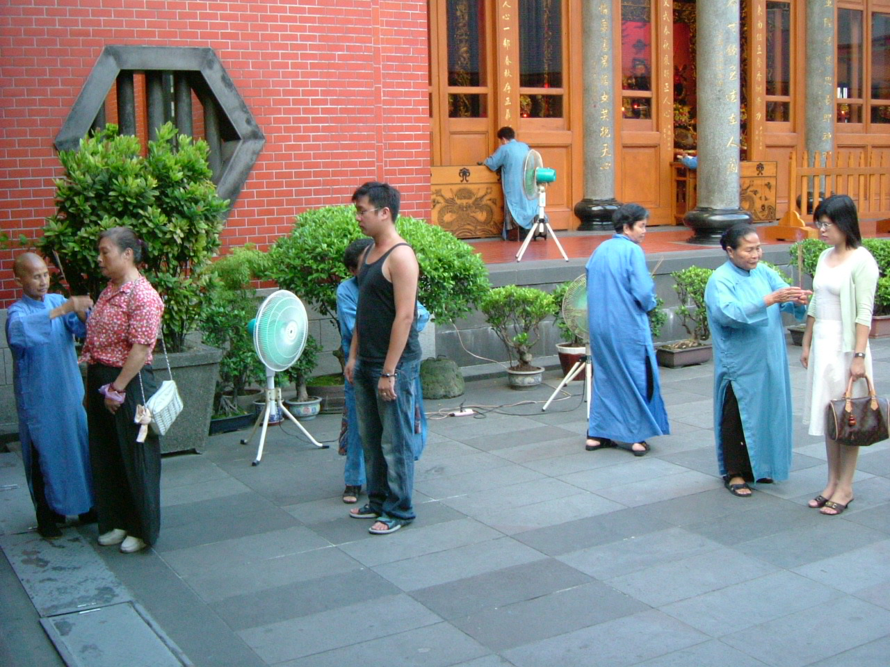 正在收驚的行天宮効勞生。